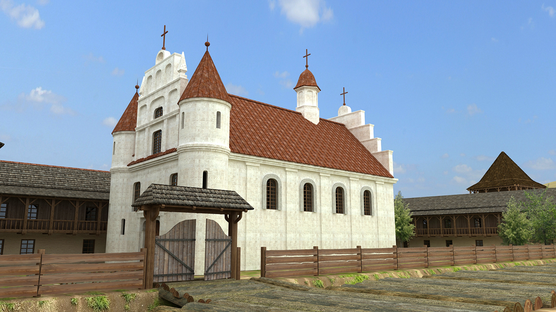 Кафедральний костел Святої Трійці у Луцьку XVI ст. Реконструкція Авраменко Д.К.